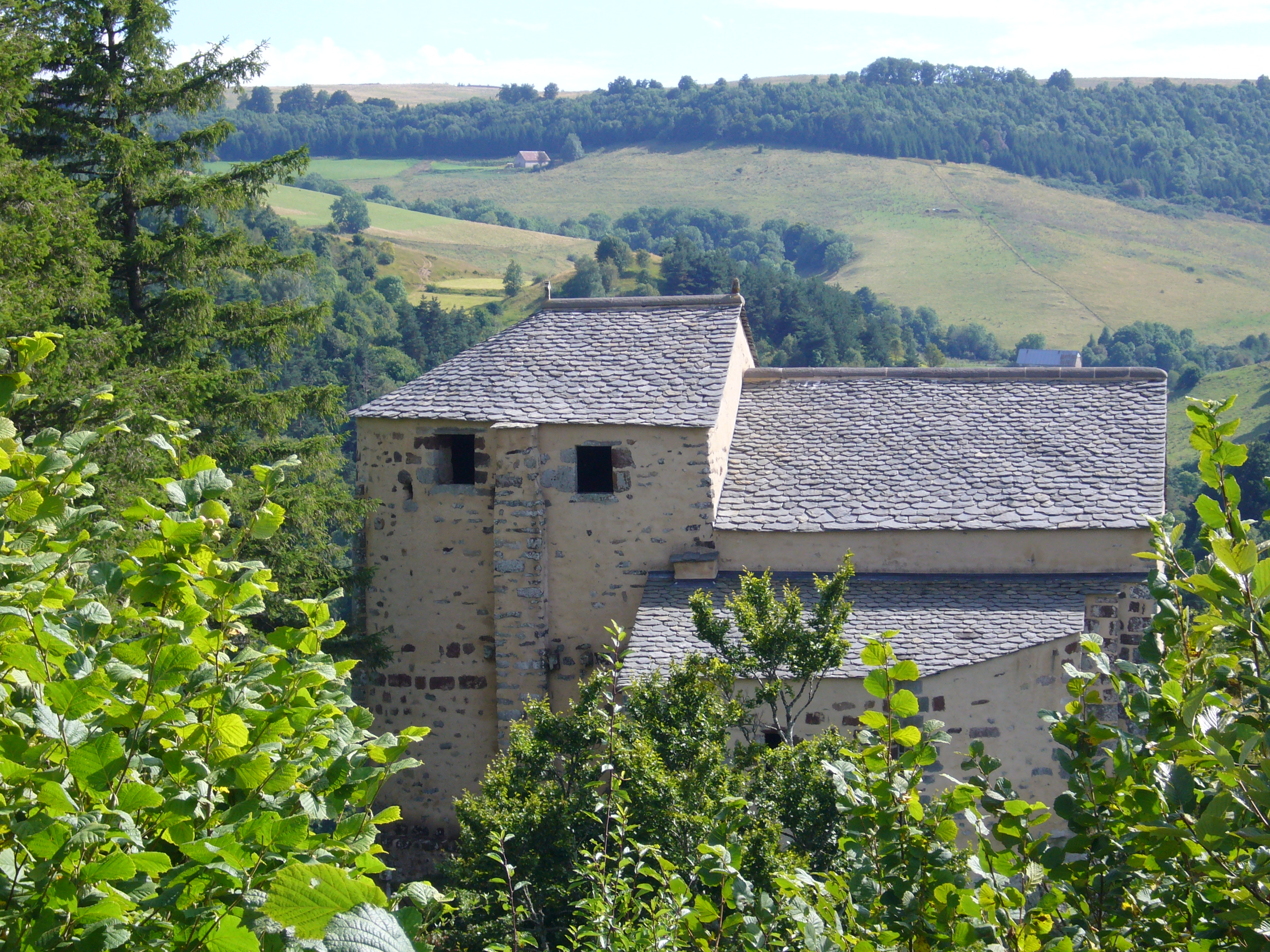 Église Saint-Roch de Roche-Charles (Inscrit) .